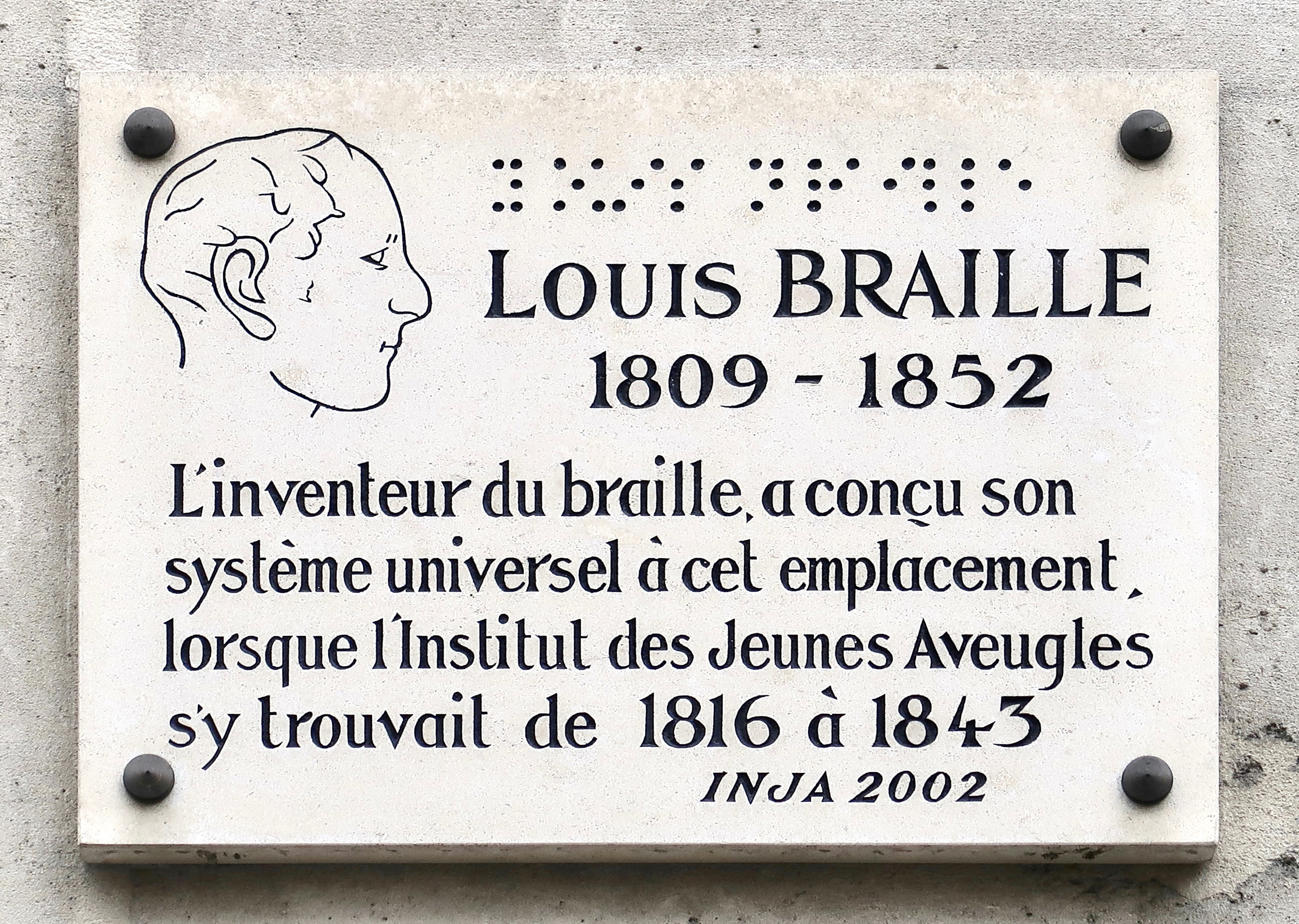 Plaque en hommage à Louis Braille, 2 rue des Écoles (Paris, 5e).